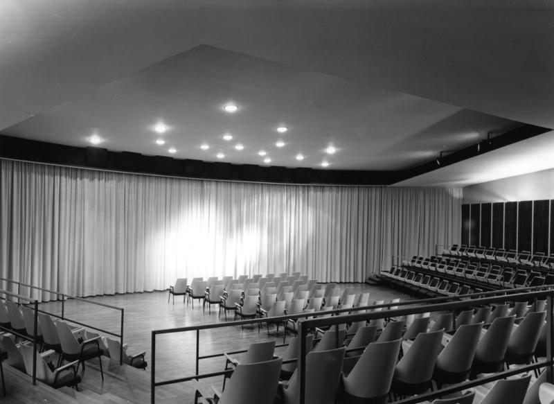 Bonn, Beethovenhalle Studie